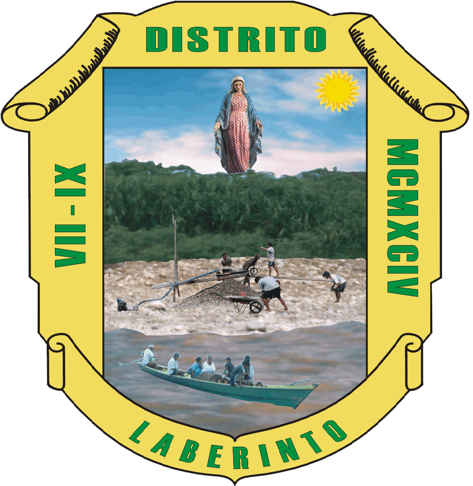 Escudo Municipalidad Distrital de Laberinto